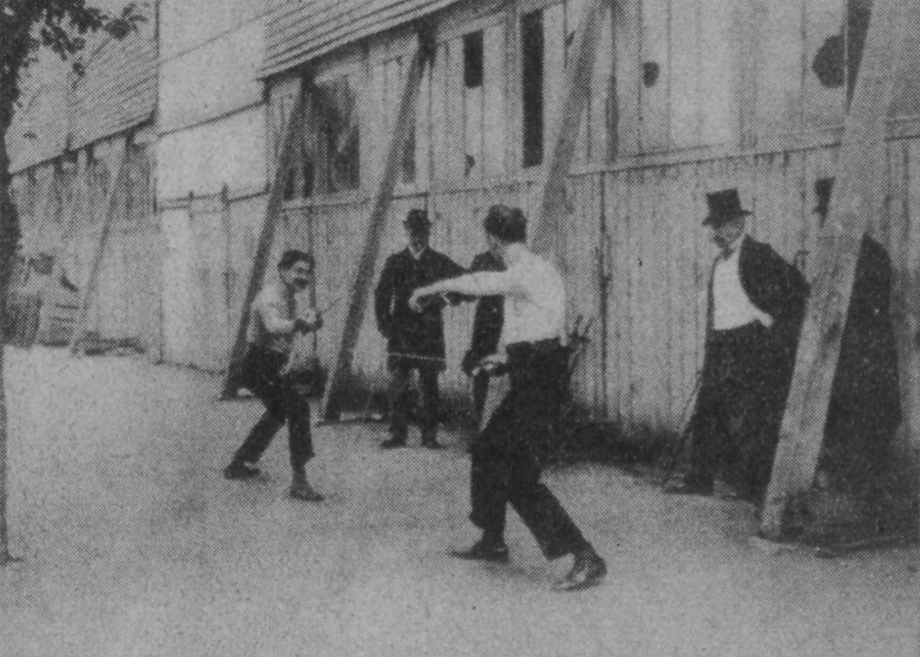 "J. Joseph-Renaud, romancier bien connu et champion notoire d'escrime, avait cette fois, en août 1903, André Gaucher pour adversaire. Malgré une belle défense de celui-ci, il le blessa au biceps".